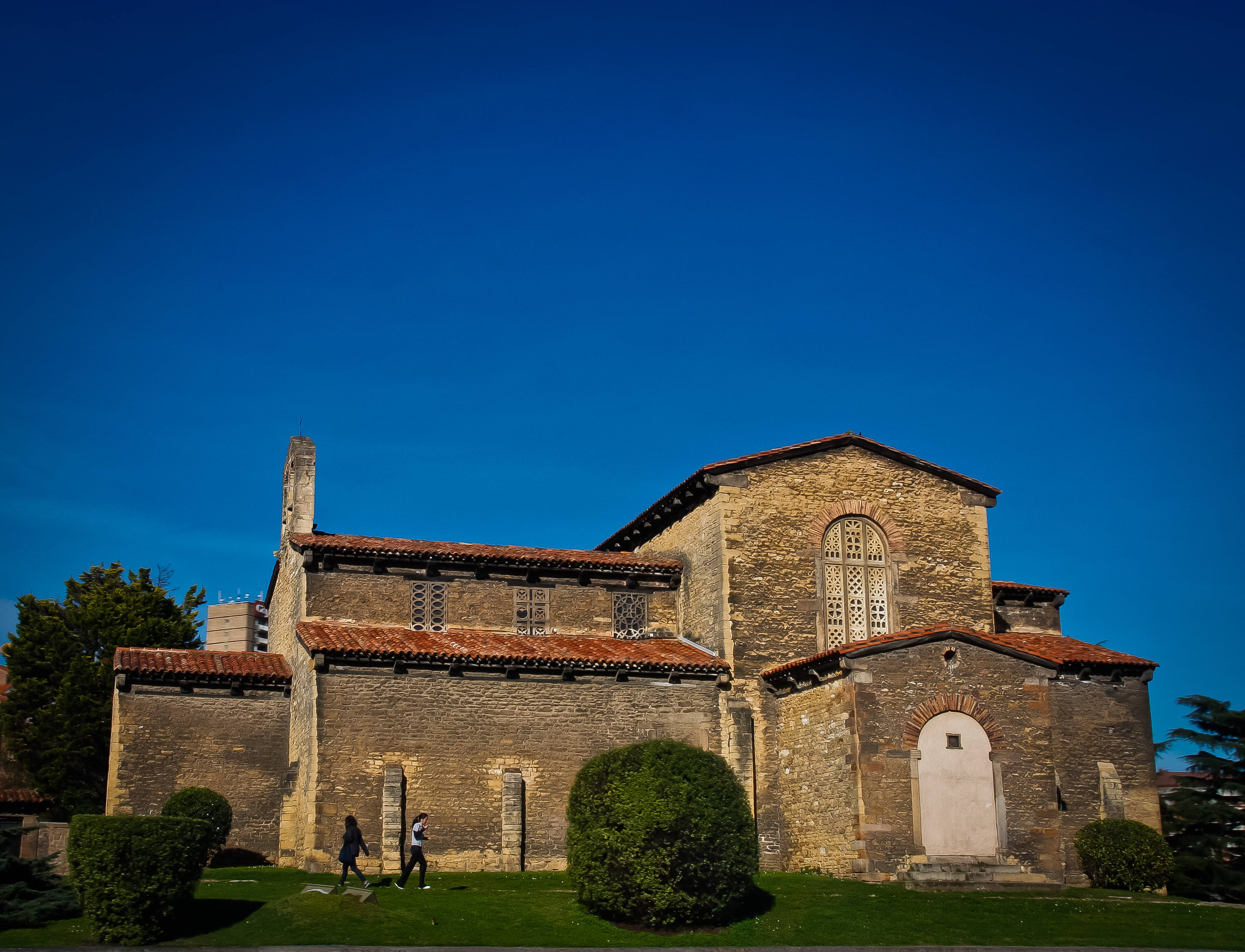 Iglesia de San Julián de los Prados